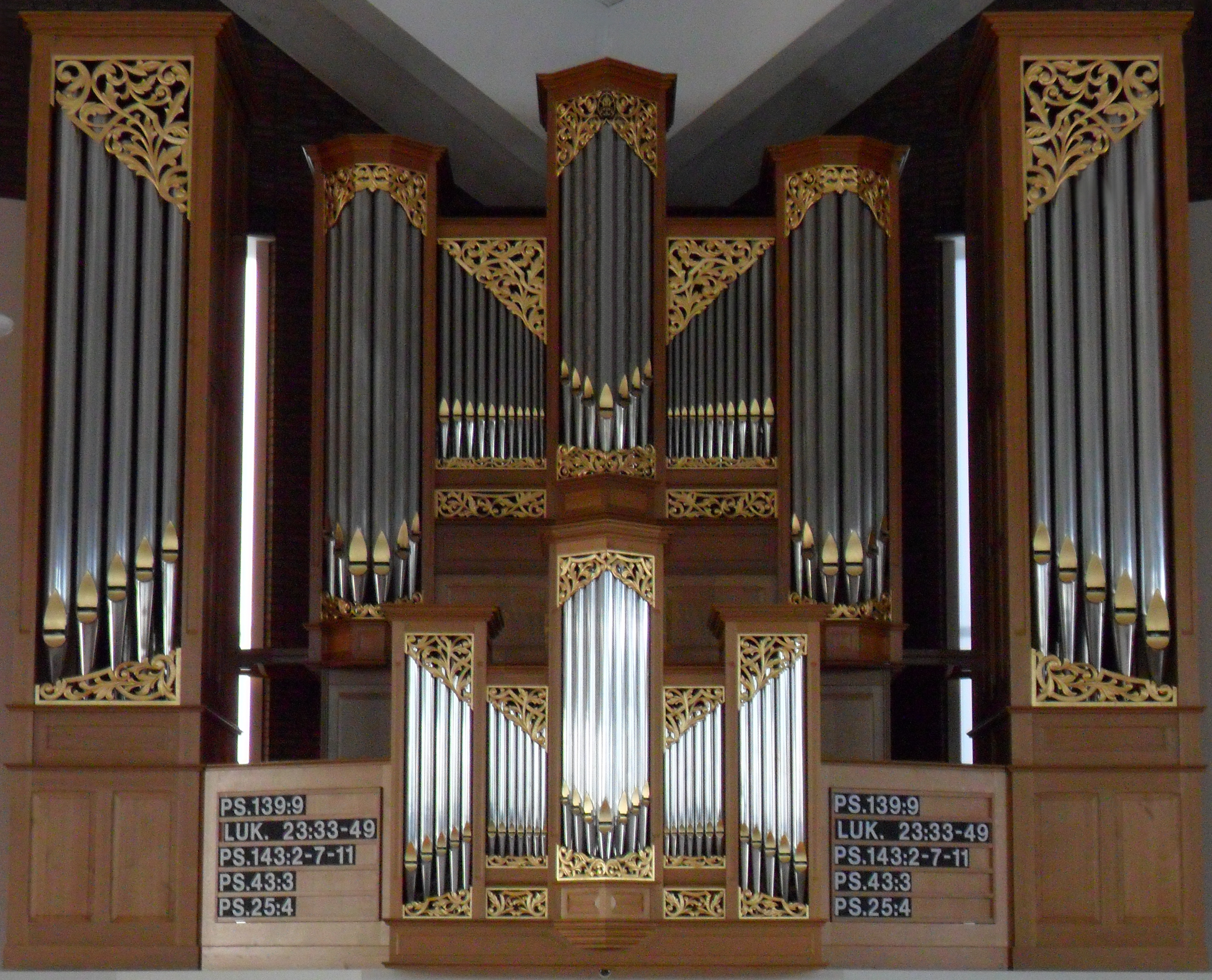 Het orgel van de Gereformeerde Gemeente te Genemuiden